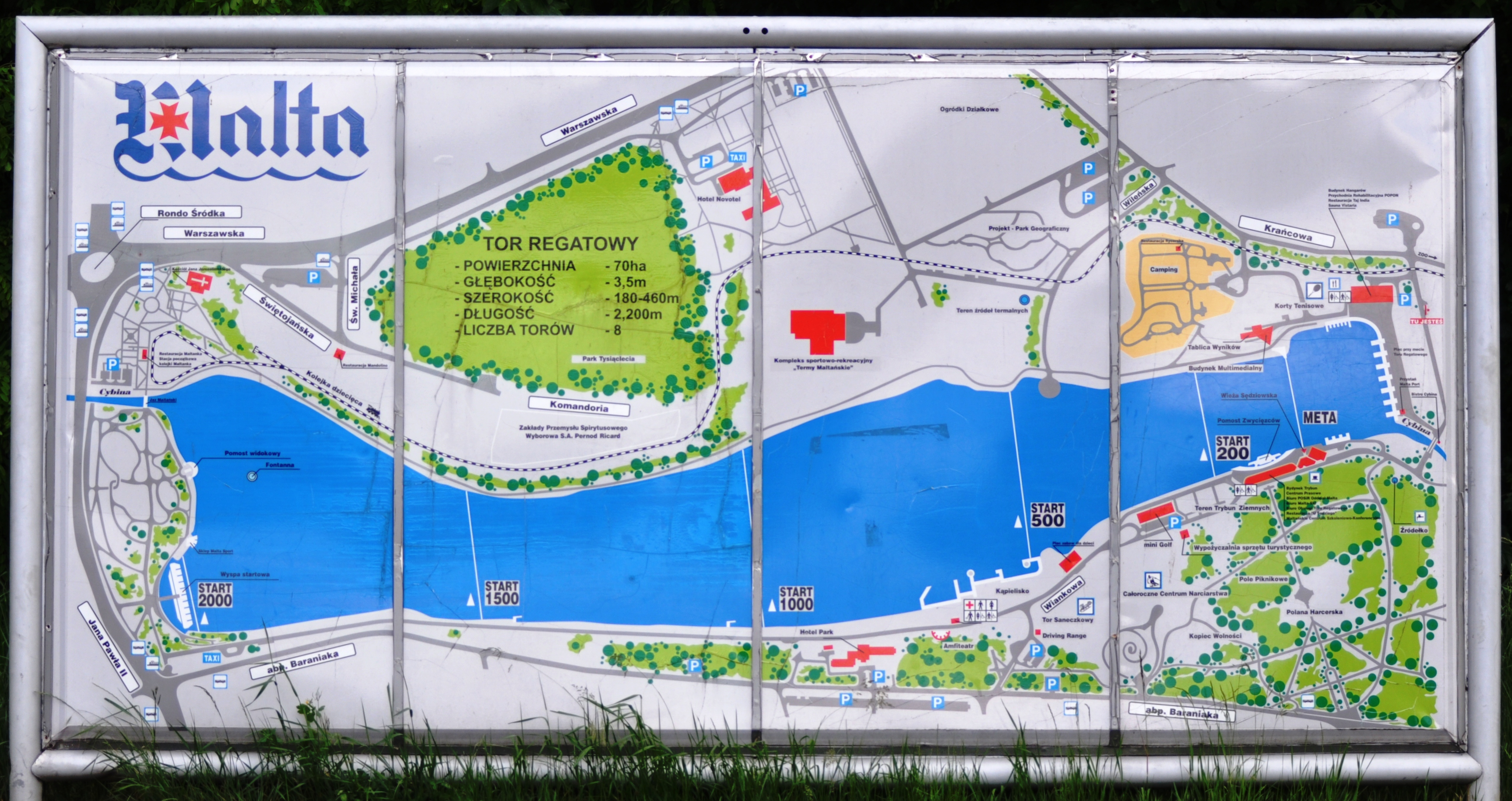 Carte du Lac Malta, à Poznan